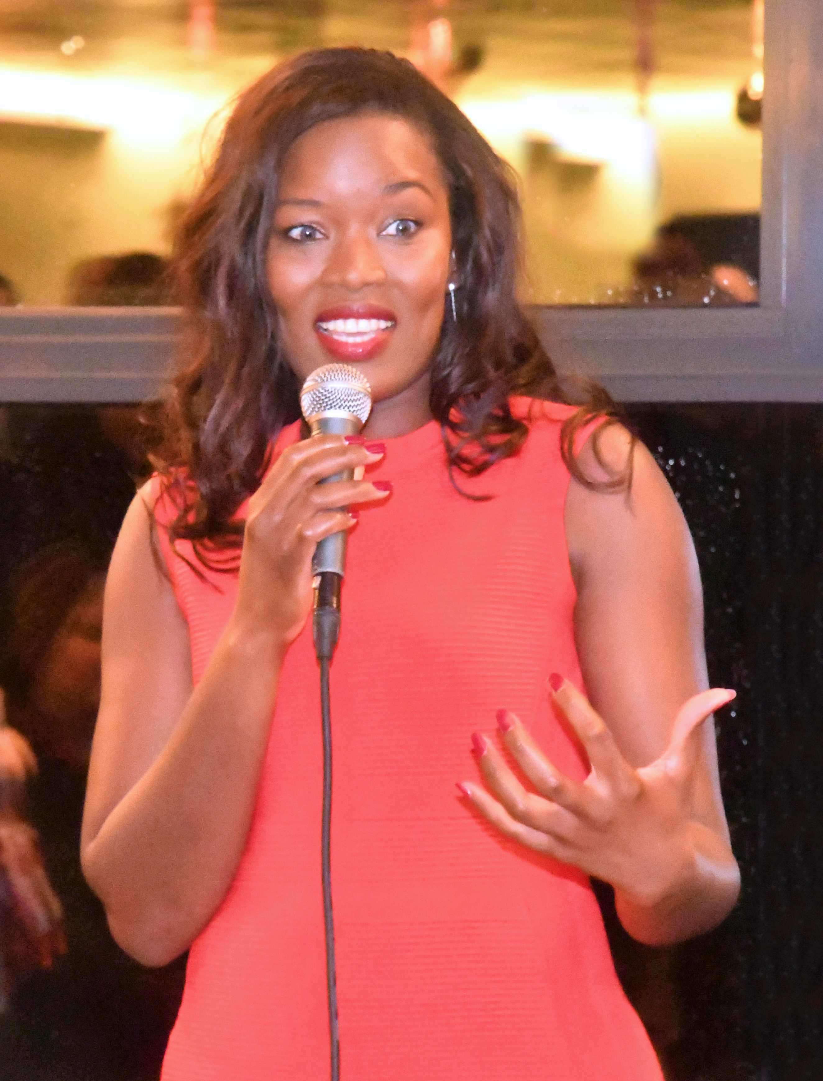 Assita Kanko als gastspreker tijdens een N-VA nieuwjaarsreceptie in Zemst